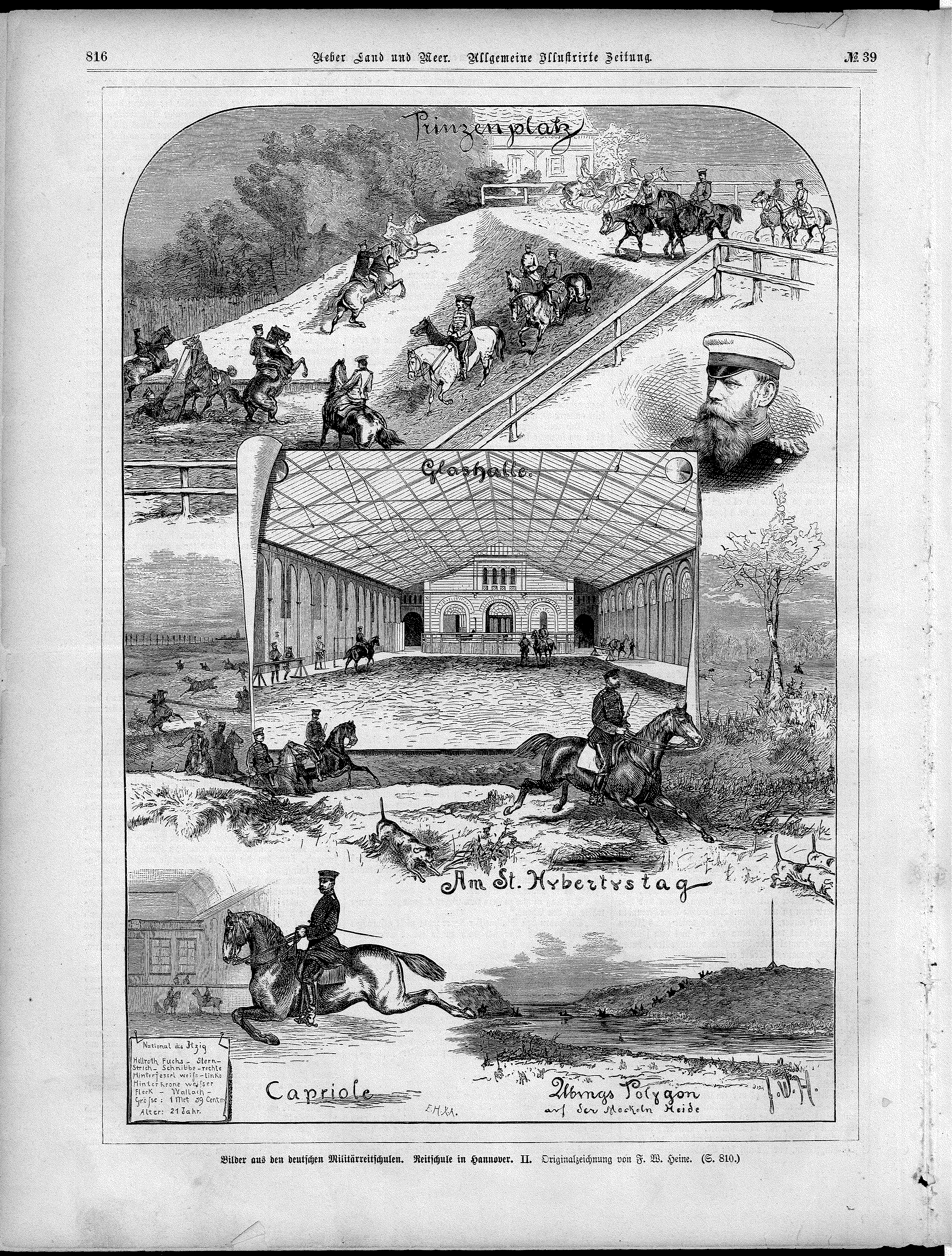 Zeitschrift Über Land und Meer von 1877, Seiten 805 bis 824 (20 Seiten), als Dateinamen jeweils mit einer führenden Null zur automatischen alphanummerischen Sortierung